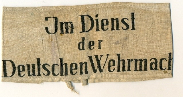 Нарукавня повязка "хиви"